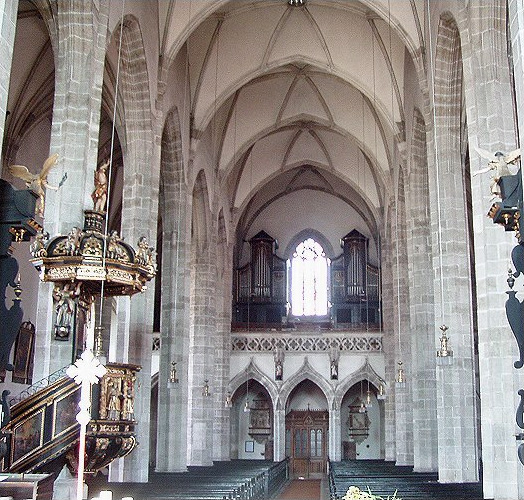 Stadtpfarrkirche von Eferding - Blick auf die Empore